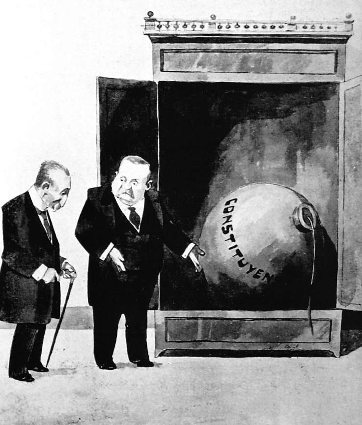 Caricatura de la Revista Variedades, Nº 282, Lima-Perú, que representa al anciano Presidente del Senado peruano, Rafael Villanueva, junto con el Presidente Guillermo Billinghurst, y en la que se alude al atentado con dinamita que sufriera el primero, el día 13 de julio de 1913. Billinghurst, que entonces sufría la oposición enconada del Congreso, amenaza a Villanueva y le dice que la bomba puesta en su casa es solo un “cohetecillo chino, comparado con este petardito que tengo a prevención que sigan ustedes esterilizando la labor de mi gobierno”.